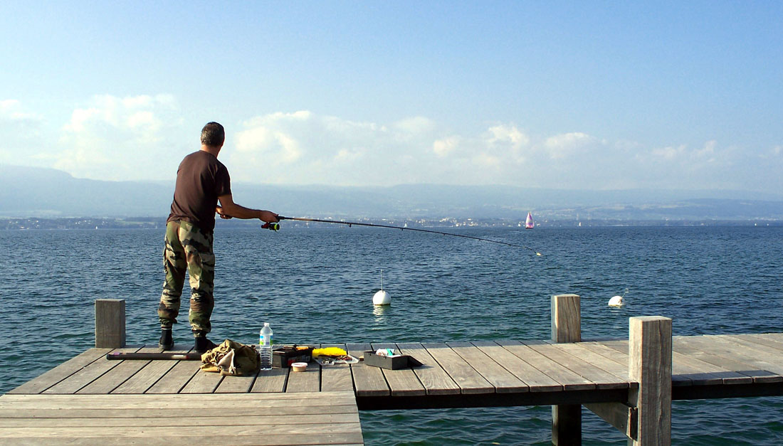 Pêcheur